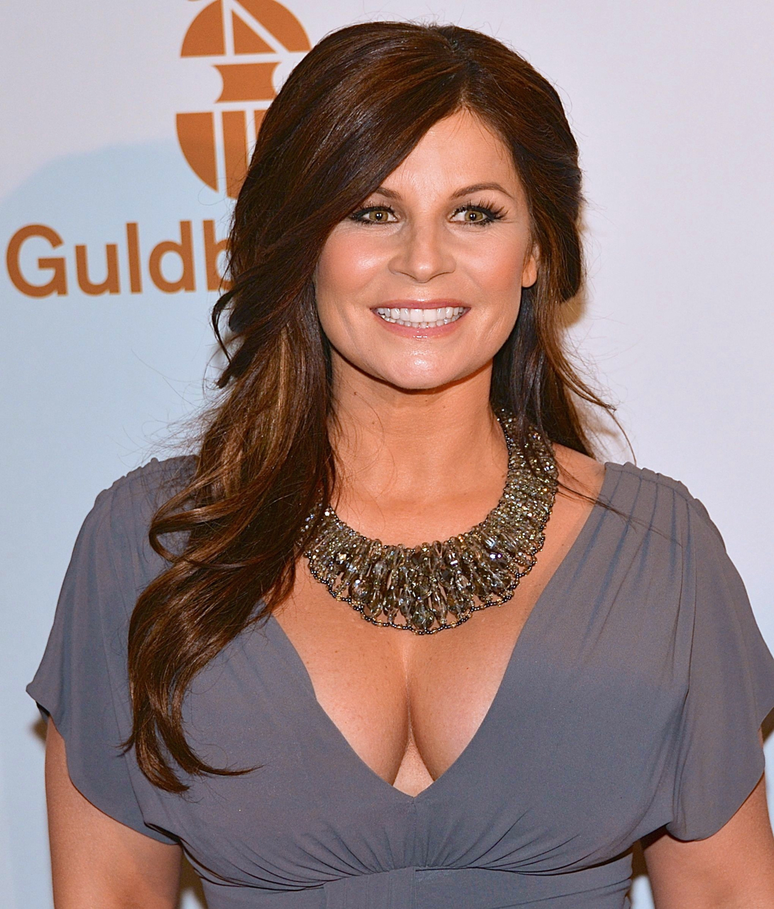 Carola Häggkvist på Guldbaggegalan på Cirkus, Stockholm den 21 januari 2013.